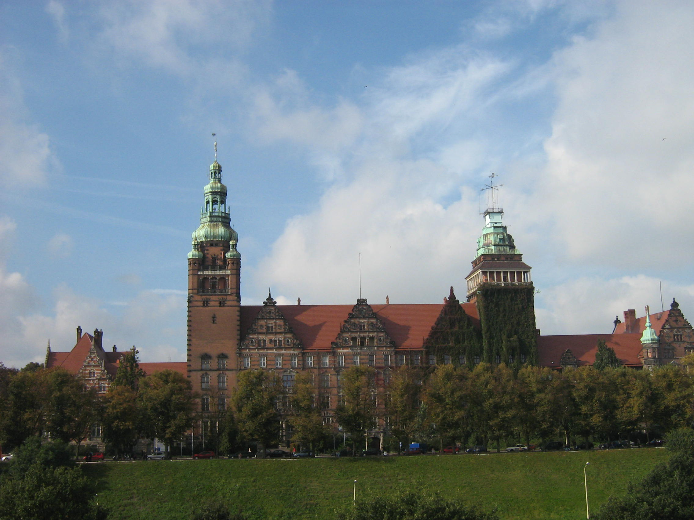 Otoczenie budynku Zachodniopomorskiego Urzędu Wojewódzkiego w Szczecinie